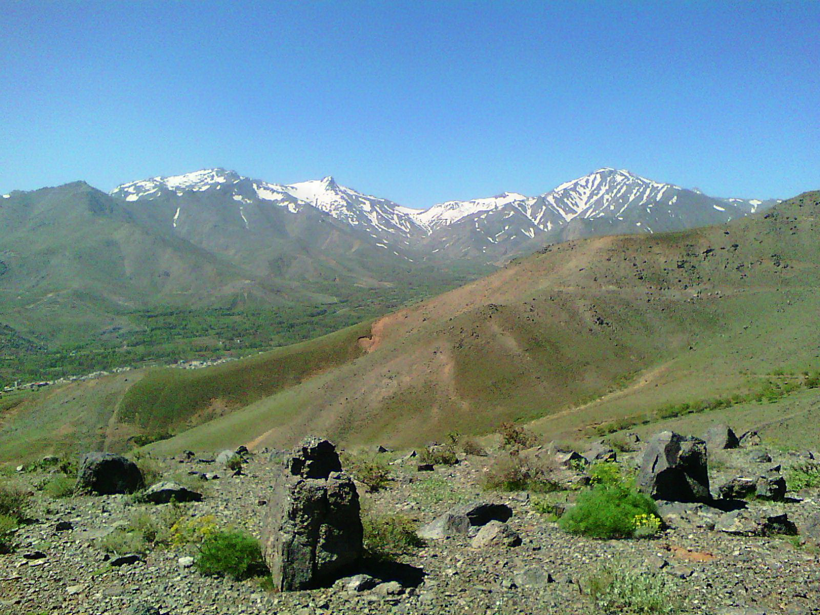 کوهستان الوند در اردیبهشت‌ماه